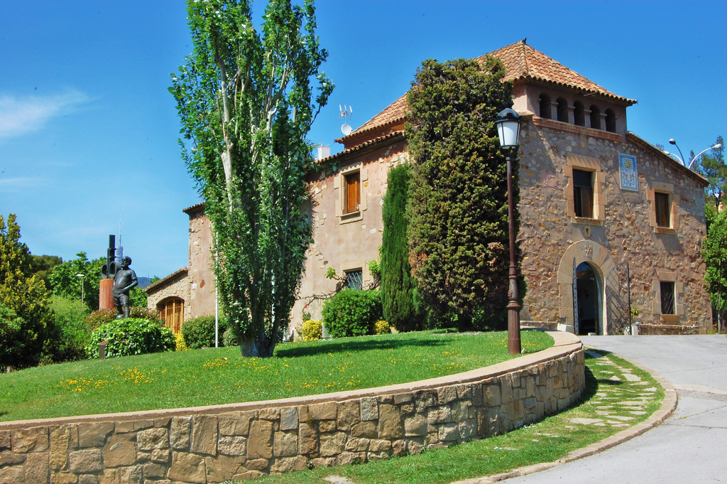 La Masia (Can Planas) (Barcelona)